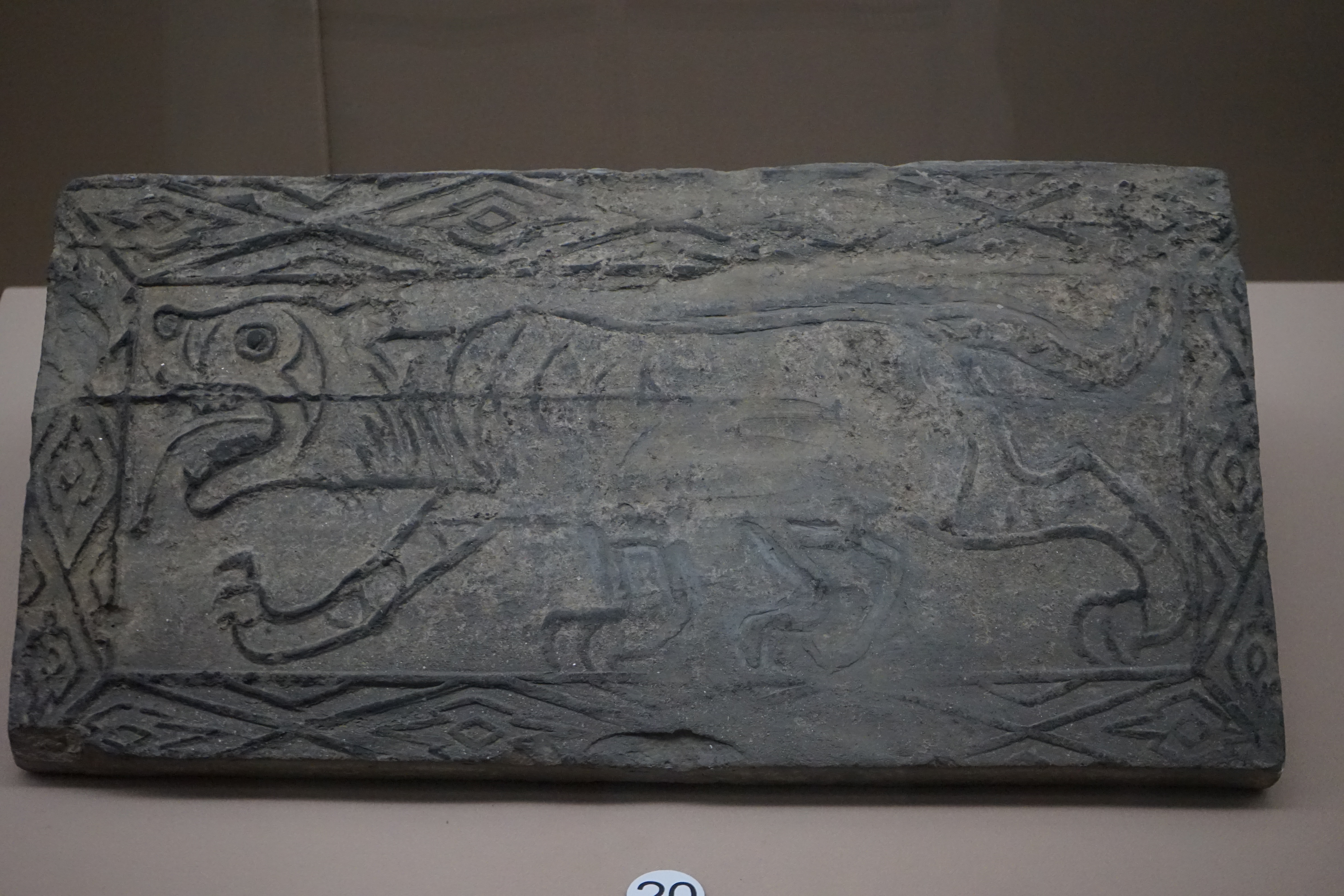 虎纹砖 汉代 周至县博物馆藏